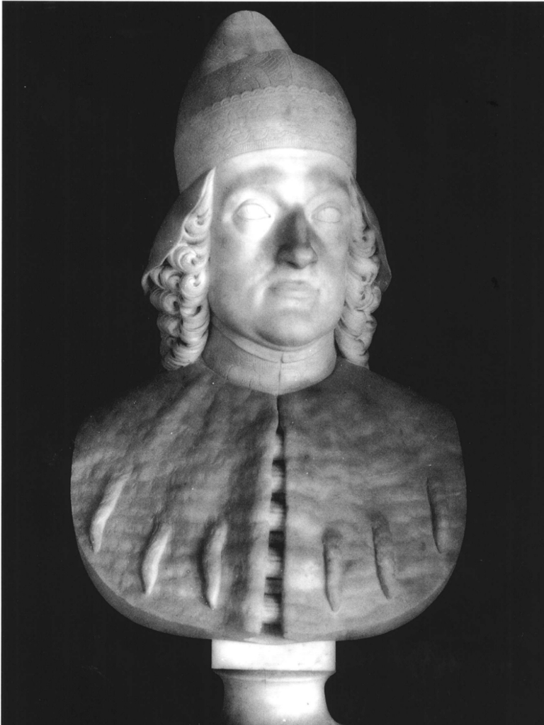 Busto di Marco Foscarini, opera di Luigi Minisini precedente al 1847. Il busto fa parte del Panteon Veneto, conservato presso Palazzo Loredan di Campo Santo Stefano a Venezia.